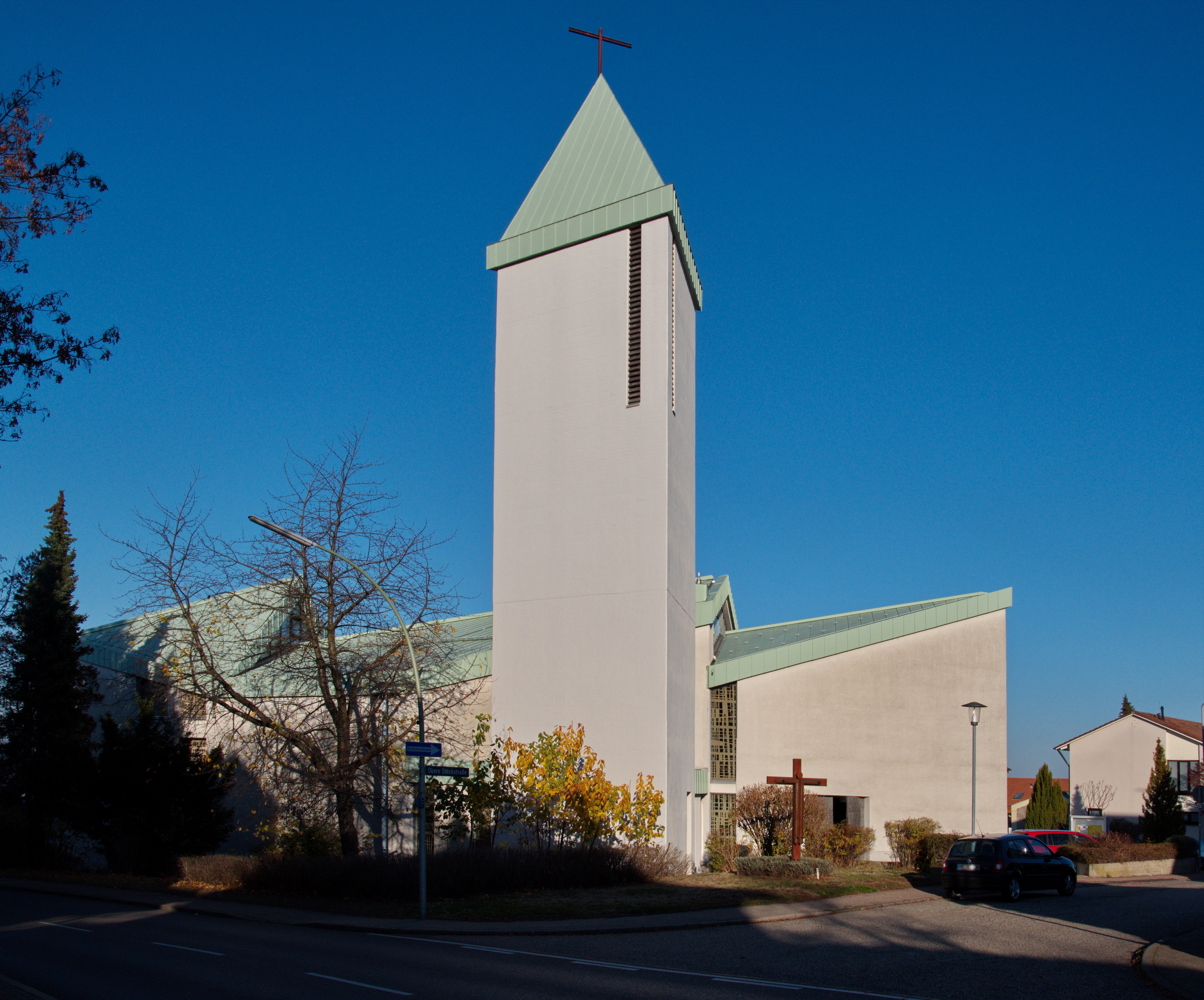 Die Heilig-Kreuz-Kirche ist eine katholische Kirche und befindet sich an der Obere-Stöck-Strasse 1 in Büchenbronn